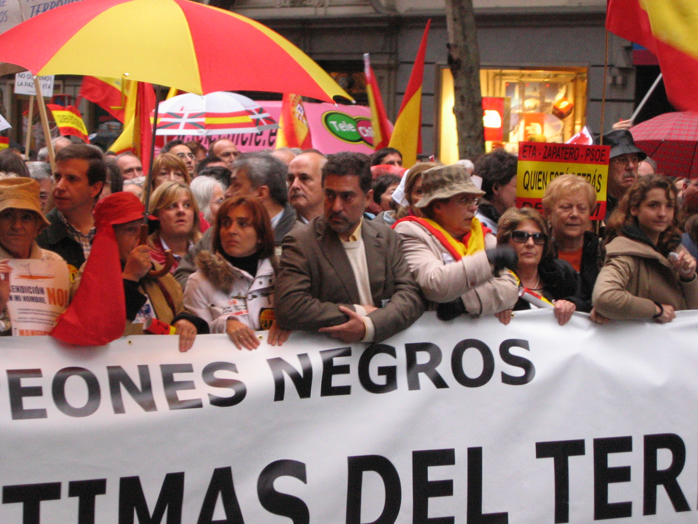 "A.k.a." El Gran Pepino